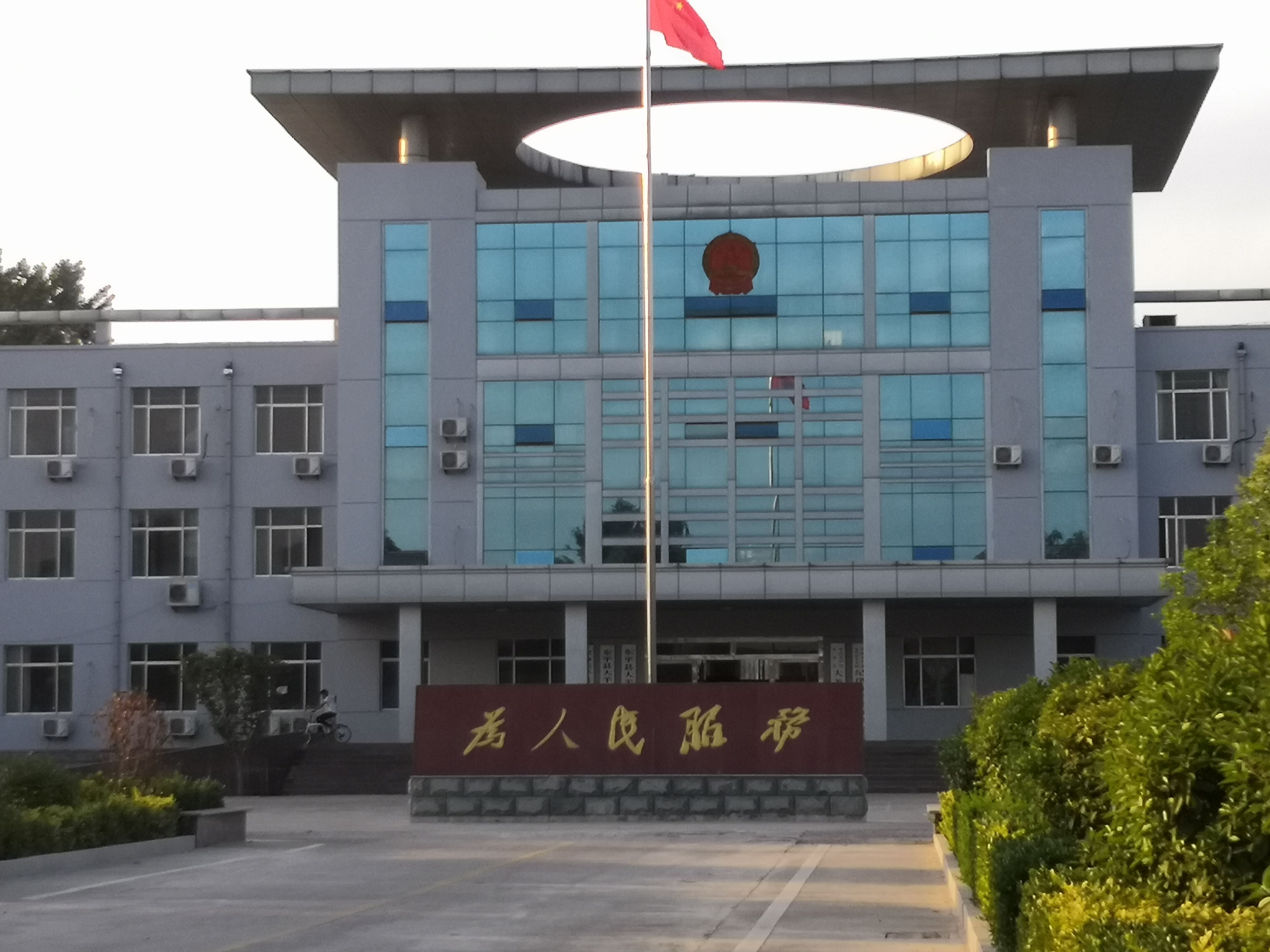 中文（中国大陆）: 大羊镇政府